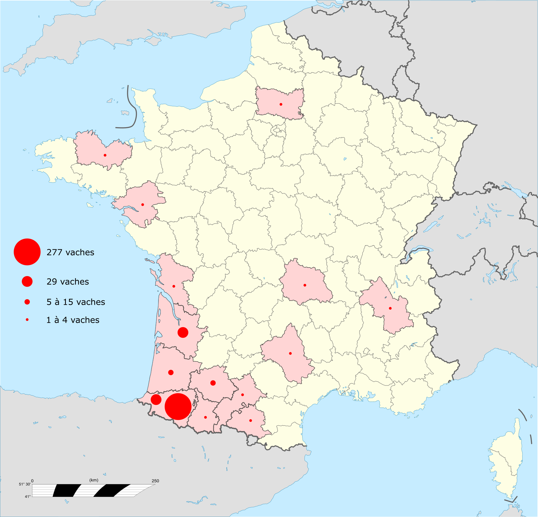 Carte illustrant la présence des vaches de race béarnaise en France en 2017. La coloration rosée indique la présence d'au moins une béarnaise dans un département, la taille du cercle indique l'importance de cette présence.